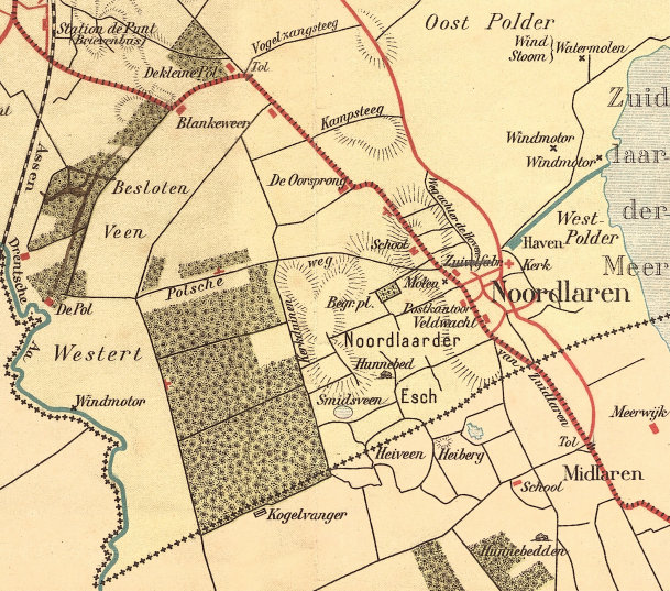 Uitsnede van de wandelkaart van Haren en omstreken met het gebied rond Noordlaren.